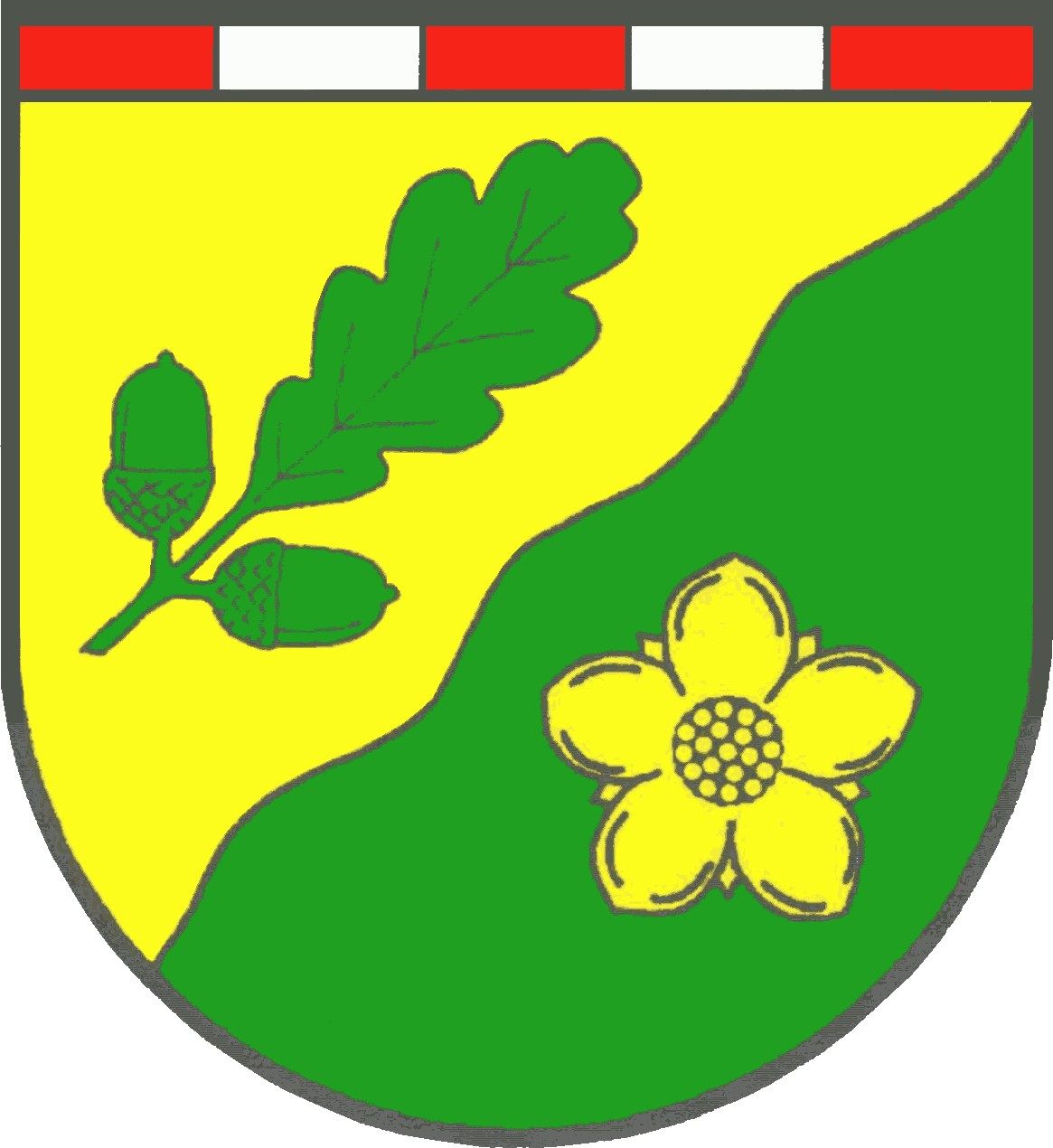 Coat of arms of the municipality Janneby in Schleswig-Holstein, Germany.